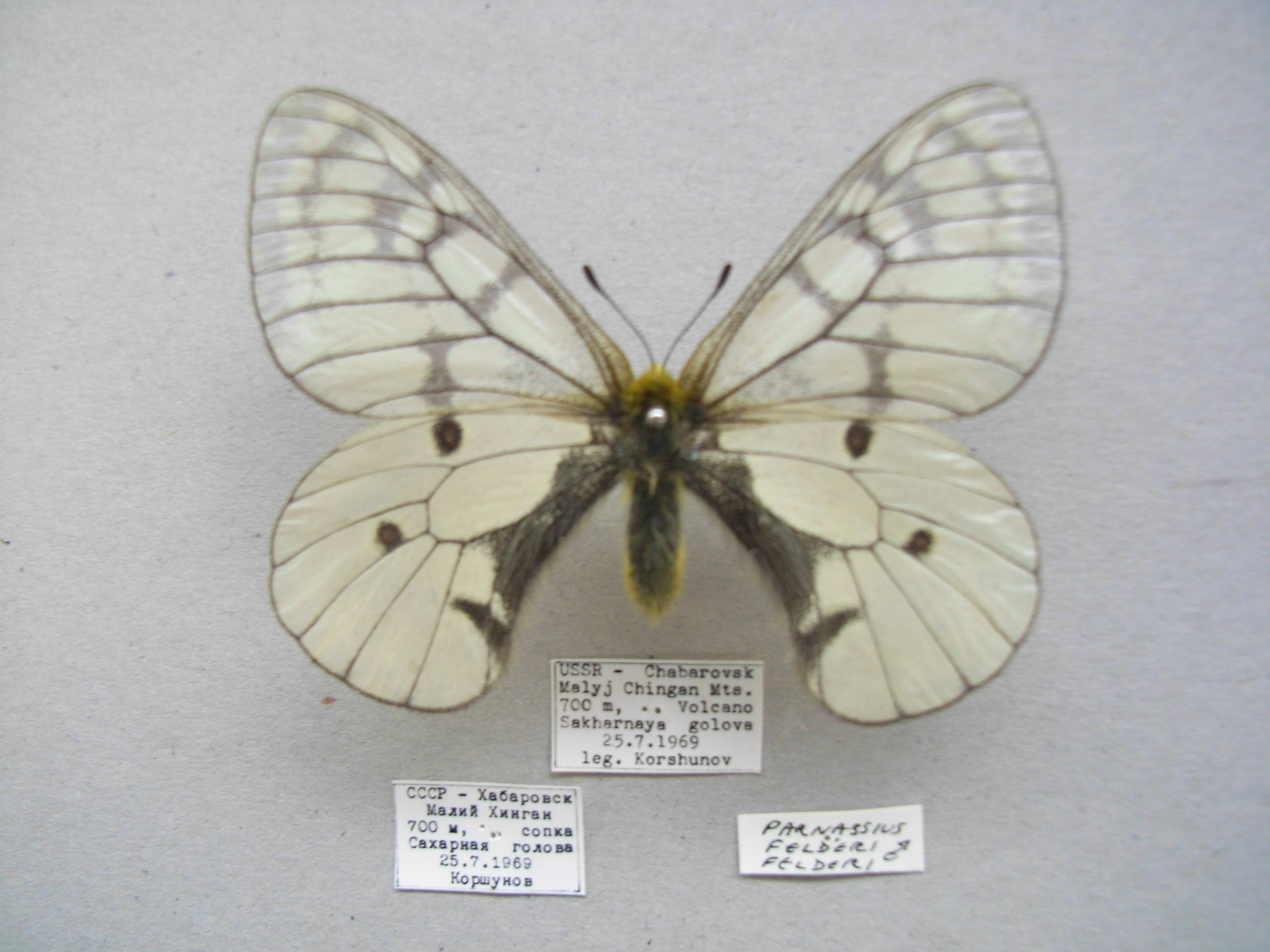 Parnassius felderi Korshunov specimen.